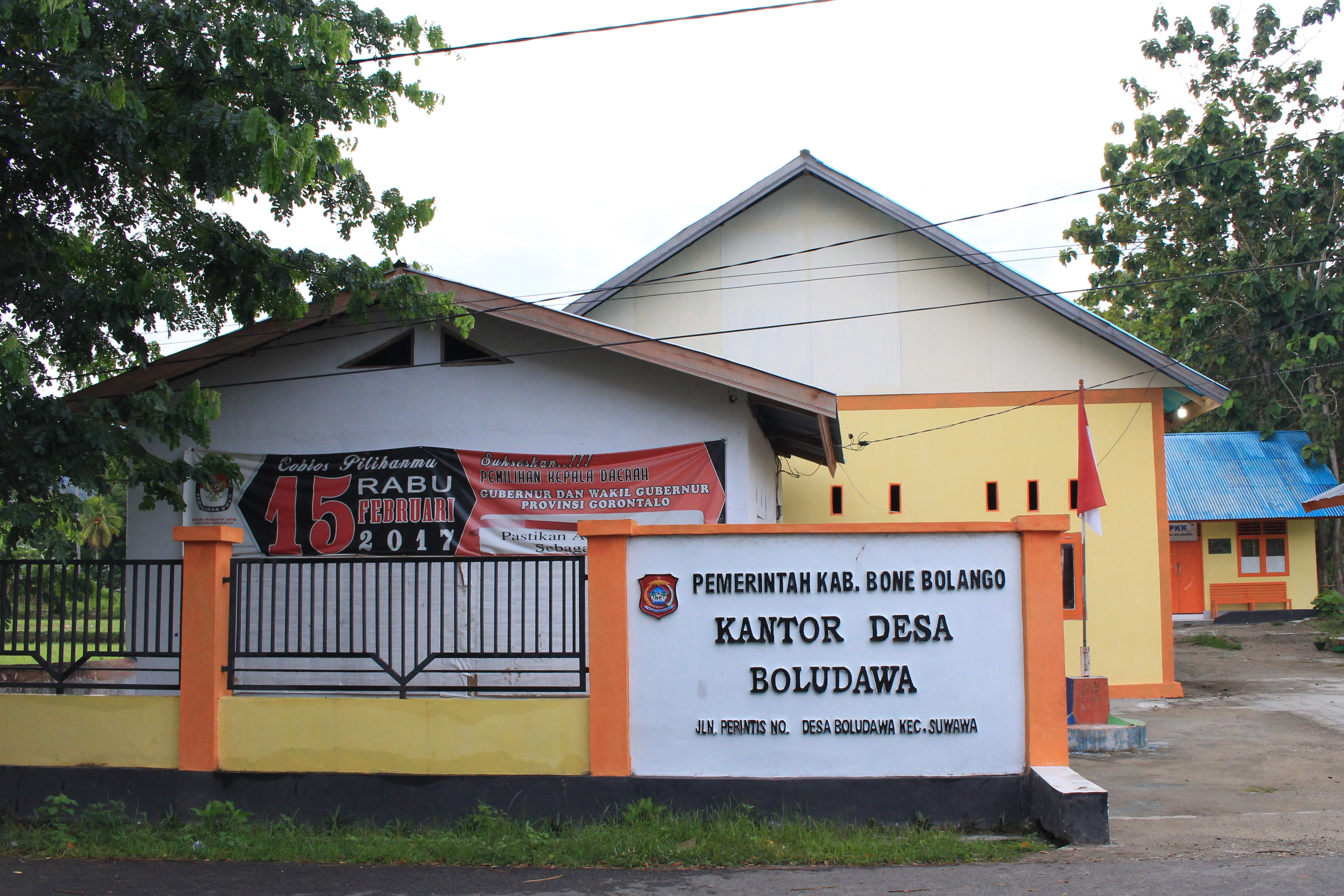 Kantor kepala desa Boludawa, kecamatan Suwawa, Kabupaten Bone Bolango, Gorontalo